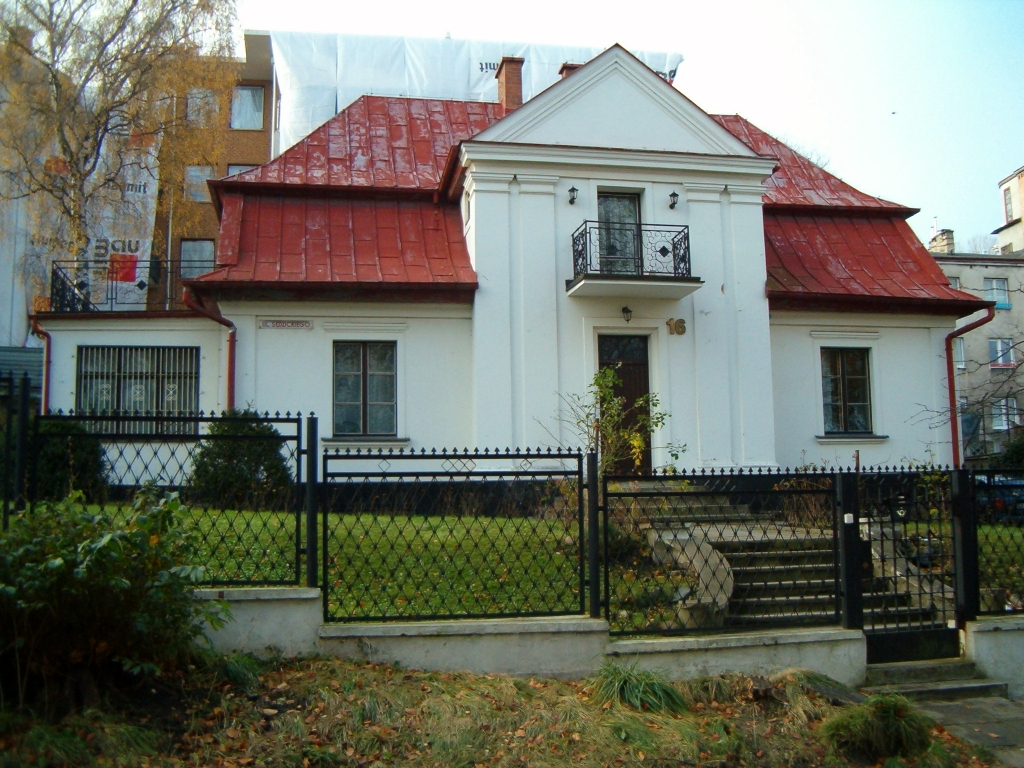 Gdynia, ul. Sędzickiego 16 - Willa "Poznanianka", 1920